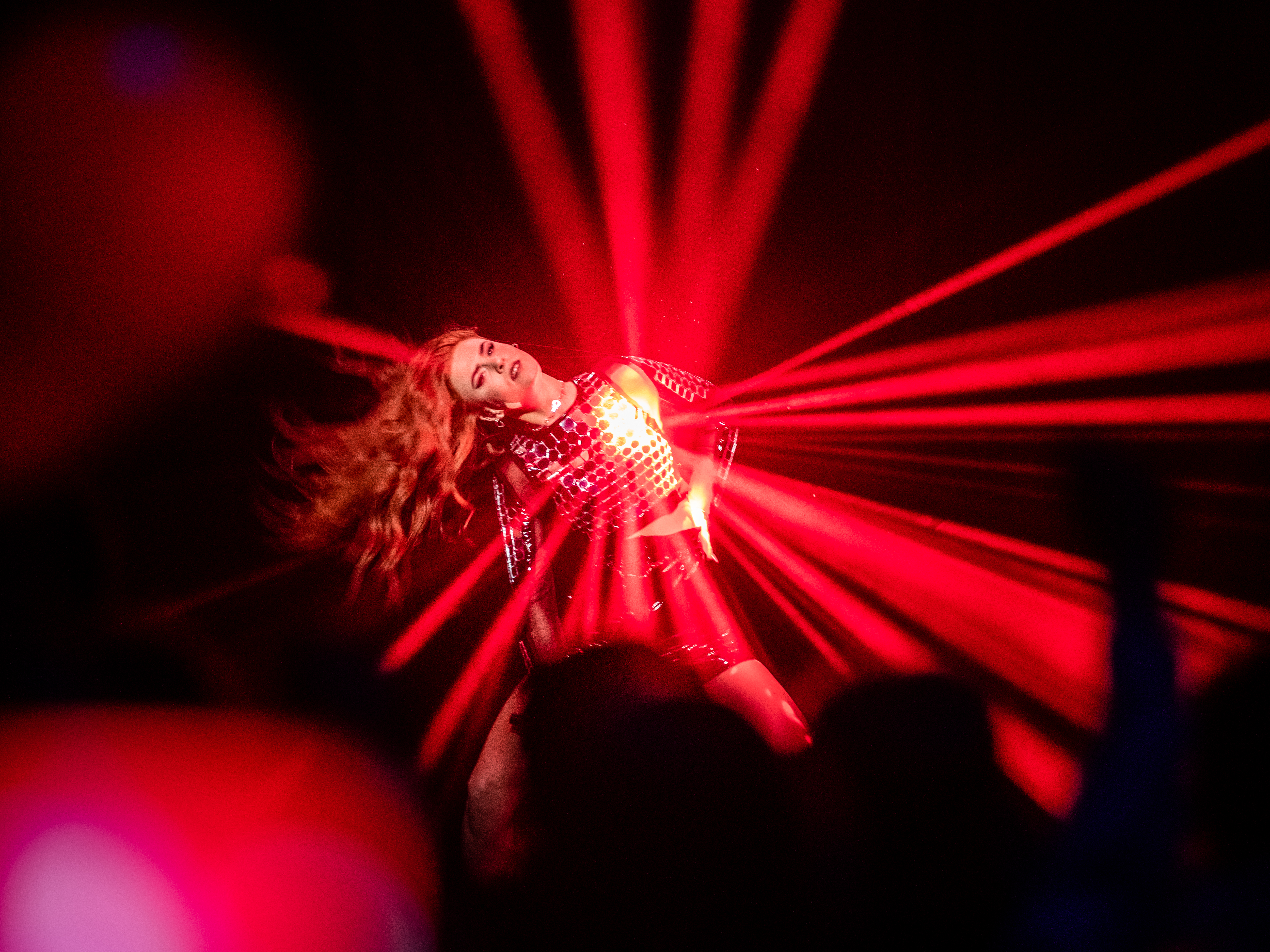 Artisten Dotter framför sitt bidrag "Bulletproof" i finalen i Melodifestivalen 2020. Bilden visar hur laserstrålar reflekteras på hennes scenklädsel.